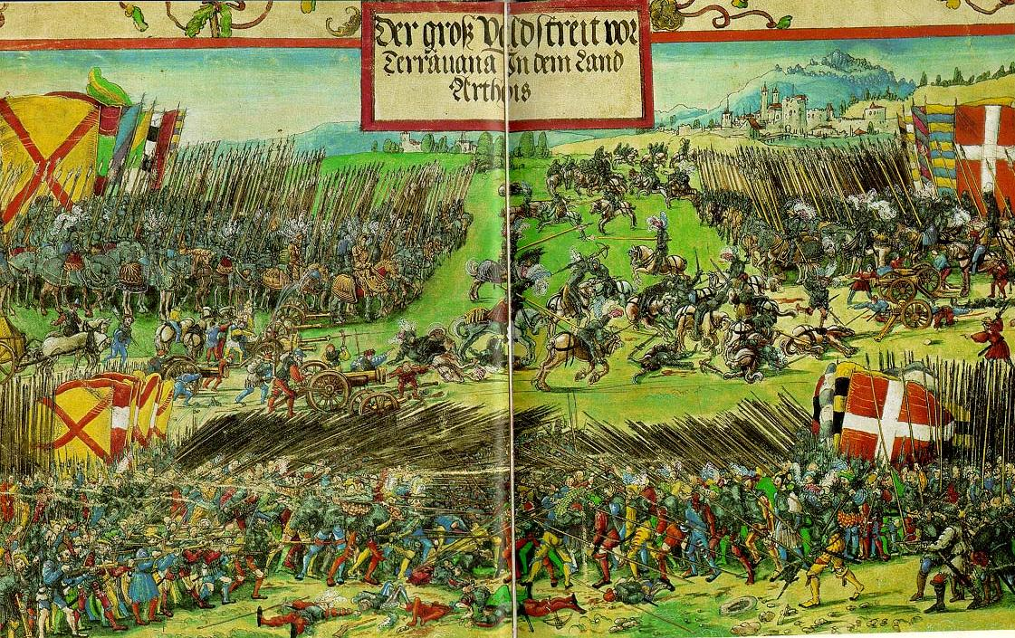 Георг Лембергер (1490/95 - 1540 гг.) Сражение при Гвинегате (1513) из серии "Триумф императора Максимилиана", 1513-15 гг.